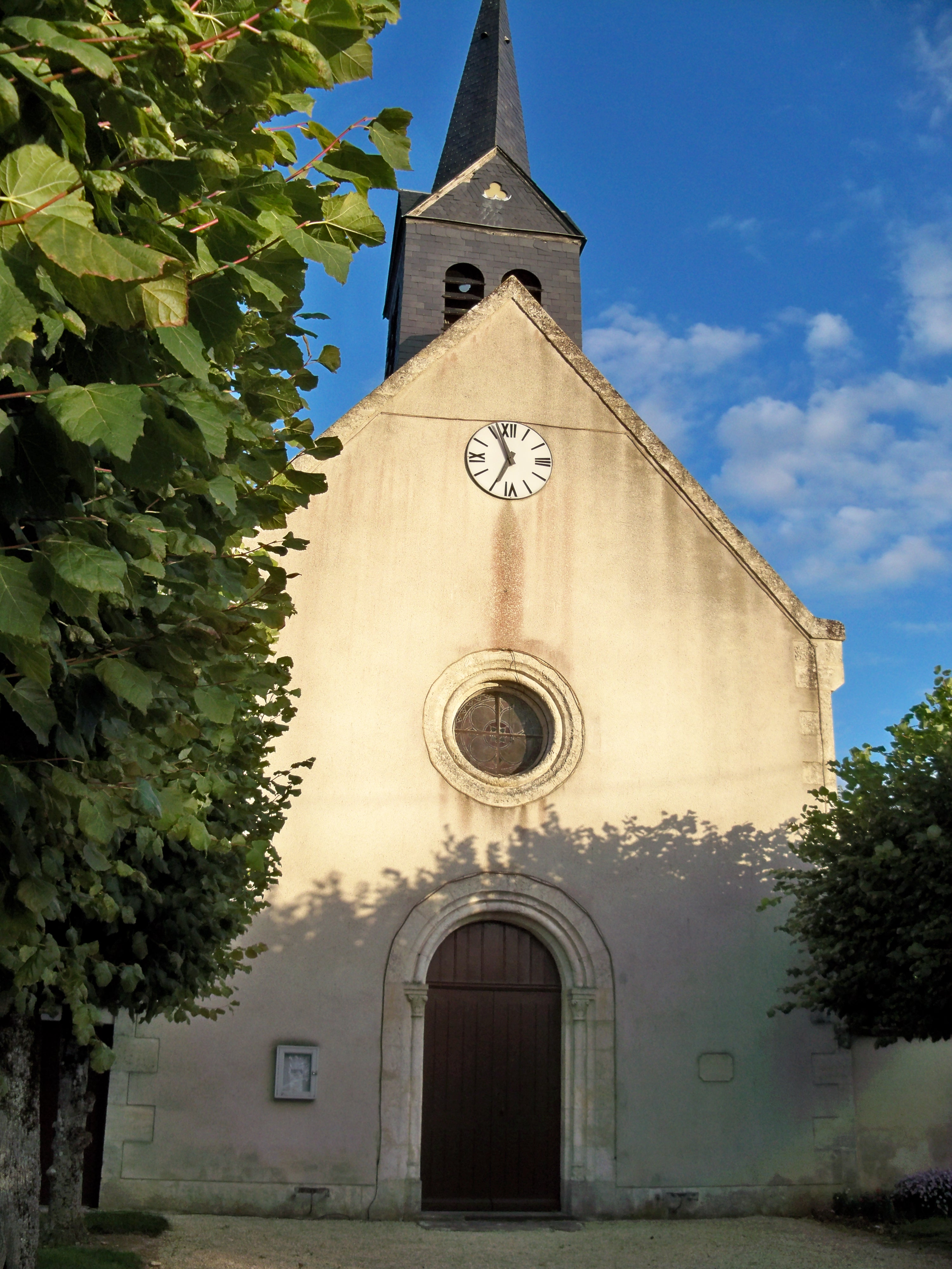 égise de Senneçay, Cher, France